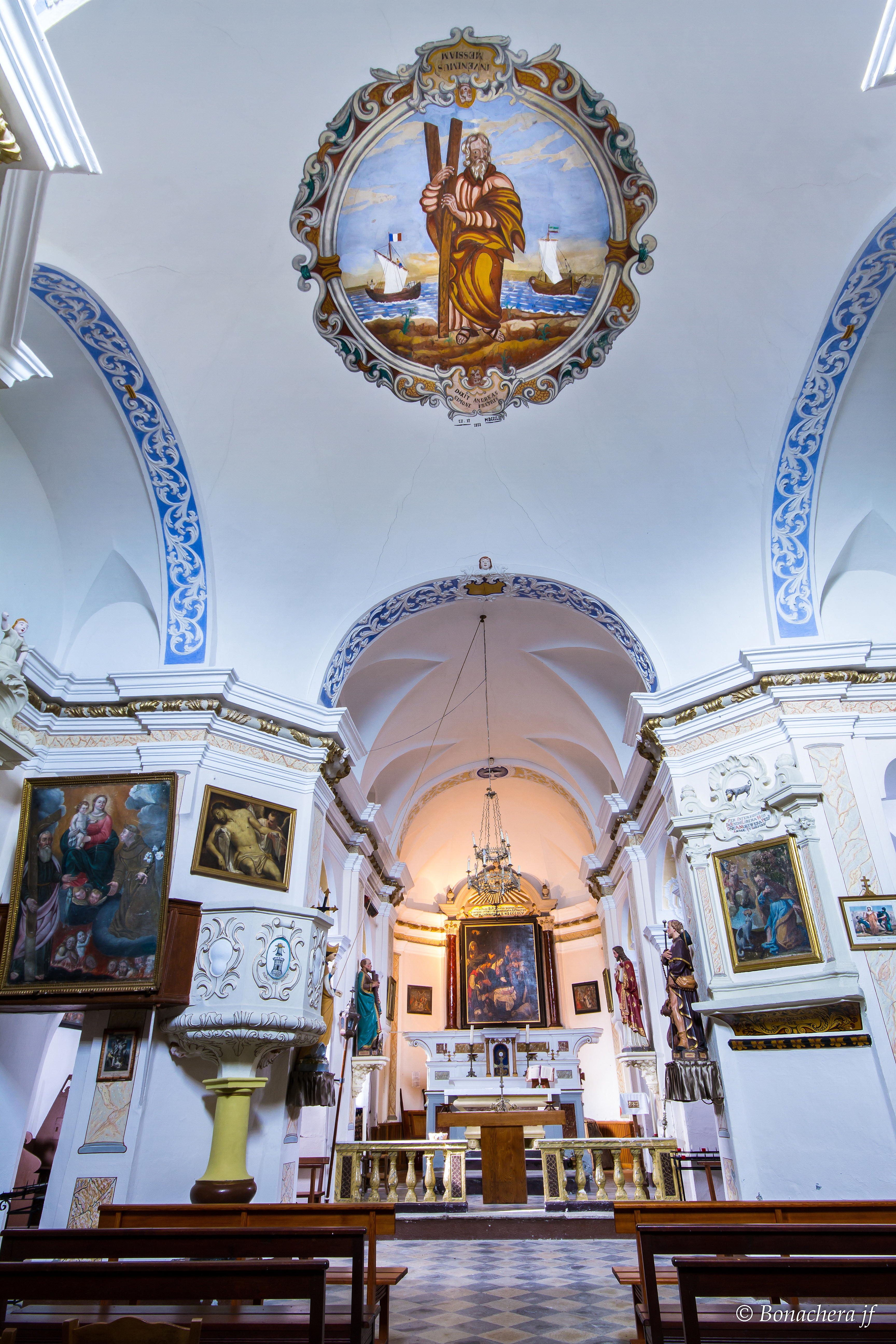 Campana (Castagniccia - (Corse) - Au plafond de l'église Sant'Andrea, une peinture monumentale de St André, du XIXe s.